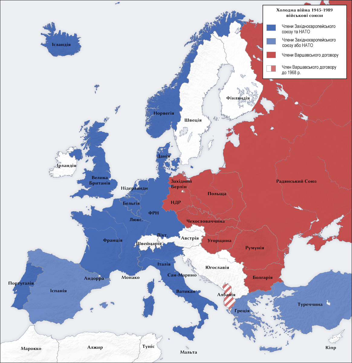 Військові союзи під час Холодної війни (1945-1989). Карта українською мовою